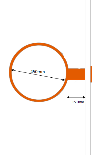 wymiary obręczy